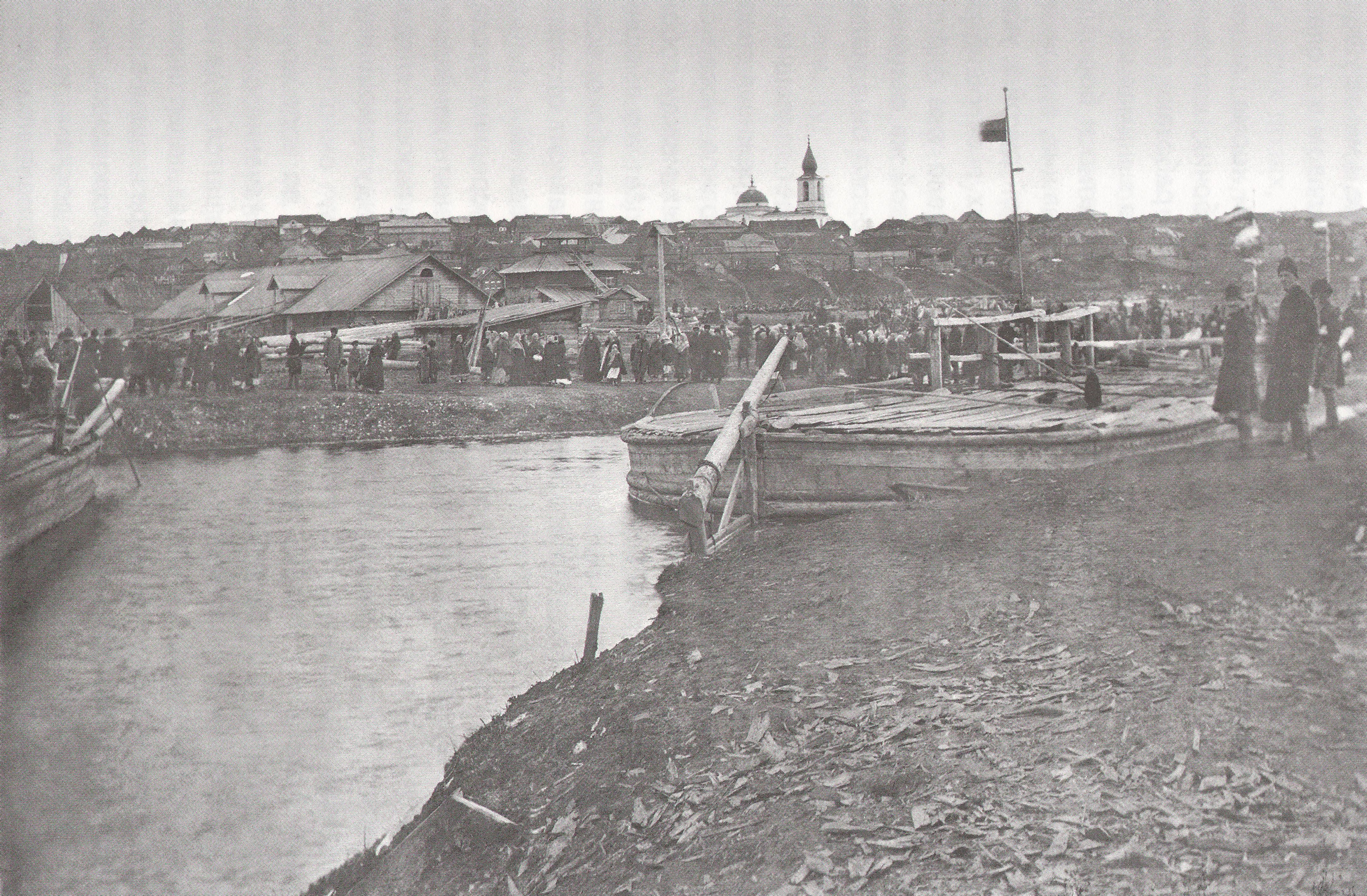 Филатов Н.Т. Вывод барок со Староуткинской пристани, 1901